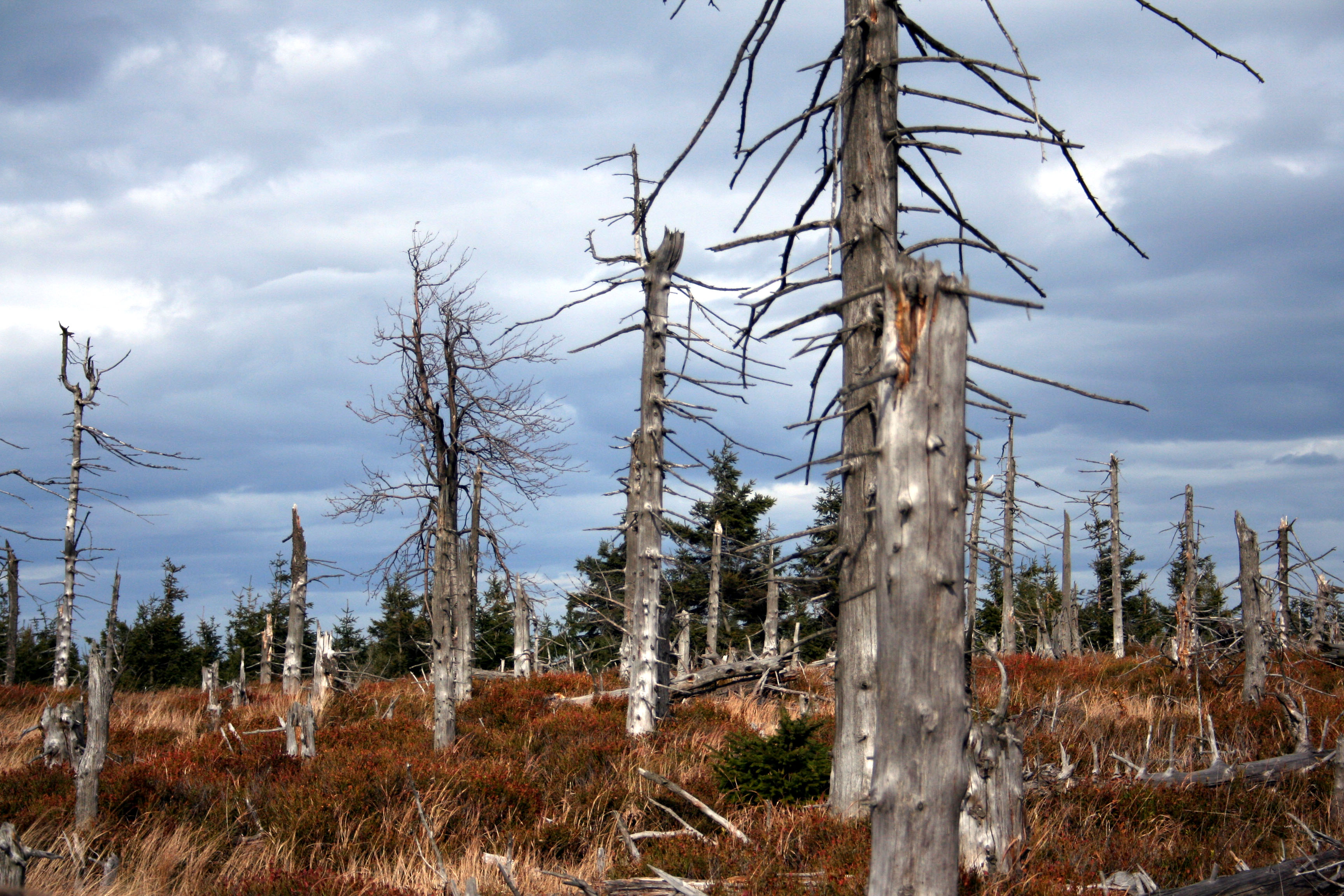 wymarły las w Górach Sowich